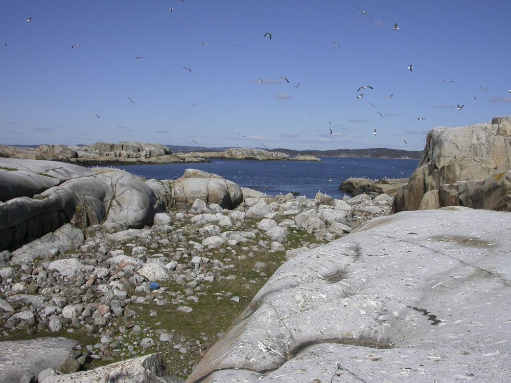 Ertholmen fuglefredningsområde